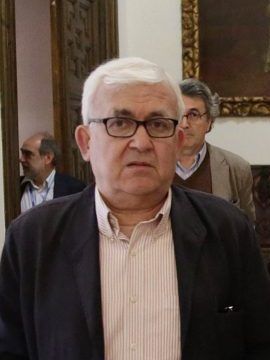 El Comisionado de Memoria Histórica propone renombrar 47 calles de Madrid. El informe ha sido aprobado por unanimidad de sus miembros en aplicación del artículo 15 de la ley 52/2007. El órgano de asesoramiento municipal que preside Francisca Sauquillo hace su recomendación a tenor de lo dispuesto en la citada norma legal, que establece que “las Administraciones públicas, en el ejercicio de sus funciones, tomarán las medidas oportunas para la retirada de escudos, insignias, placas y otros objetos o menciones conmemorativas de exaltación, personal o colectiva, de la sublevación militar, de la Guerra Civil y de la represión de la dictadura” del general Francisco Franco. Las propuestas de nuevas denominaciones se basan en el principio general de recuperar los nombres antiguos de las calles, especialmente cuando son aún recordados y nombrados así por los vecinos. Cuando esto no sea posible por razones diversas, el Comisionado considera que se debe homenajear a mujeres ilustres, a instituciones pedagógicas o personajes de la cultura que contribuyeron a engrandecer el patrimonio inmaterial en tiempos difíciles, y a políticos que se caracterizaron por la defensa de posiciones conciliatorias.